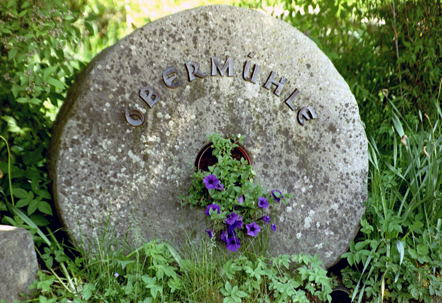 Deutschland - Baden-Württemberg - Bodenseekreis - Kressbronn am Bodensee - Obermühle: alter Mühlstein an der Obermühle